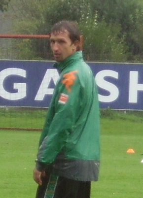 Frank Baumann / Trainingsanlagen am Weserstadion